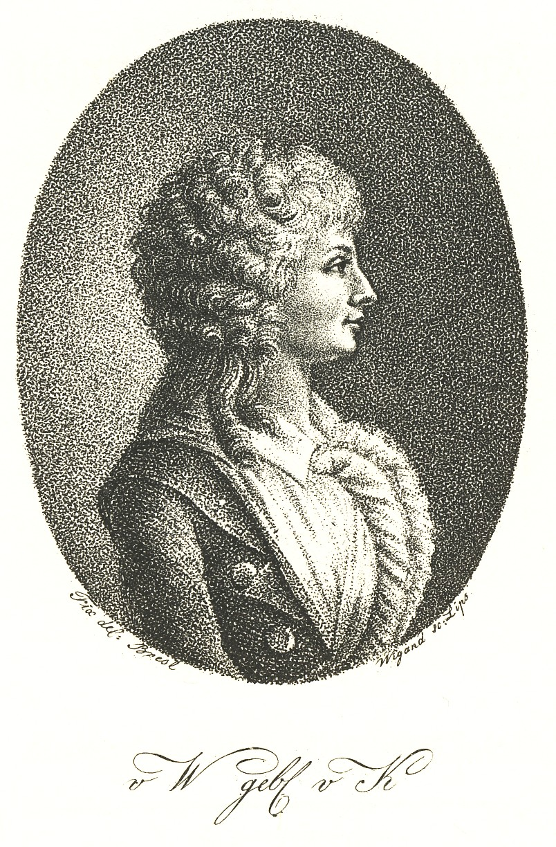 German writer Johanna Isabella Eleonore von Wallenrodt